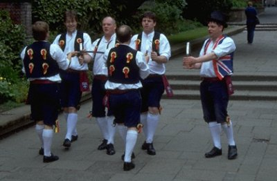 Die Newcastle Kingsmen Schwerttänzer beim Aufführen des Rapper-Kettenschwerttanzes (siehe Rapper Sword) in Mai 1999. Diese Figur ist die »Fixy«. Nebenan steht der »Tommy«, einer der zwei komische, zum Rapper-Tanz wesentliche Charakter; er erzählt scherzhaft den Zuschauer, die Figur sei der größte Toastständer der Welt!